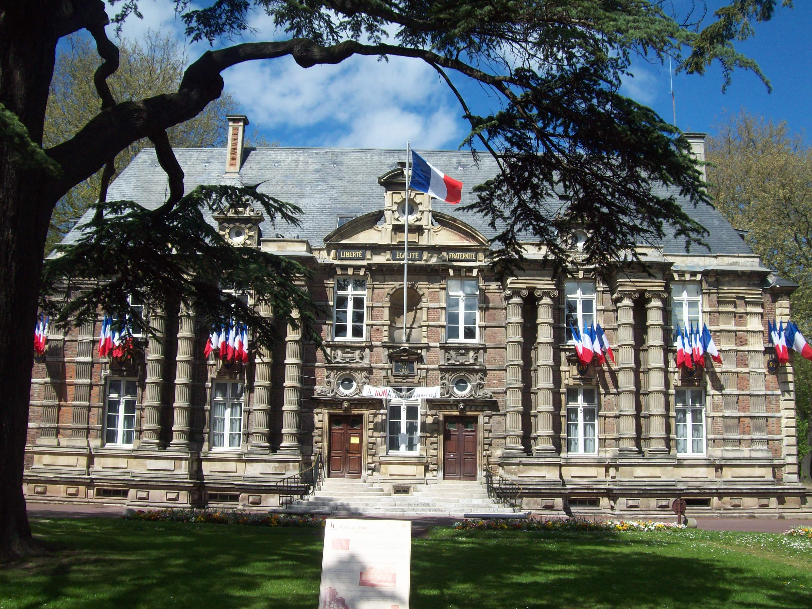 Mairie d’Harfleur (Seine-Maritime)